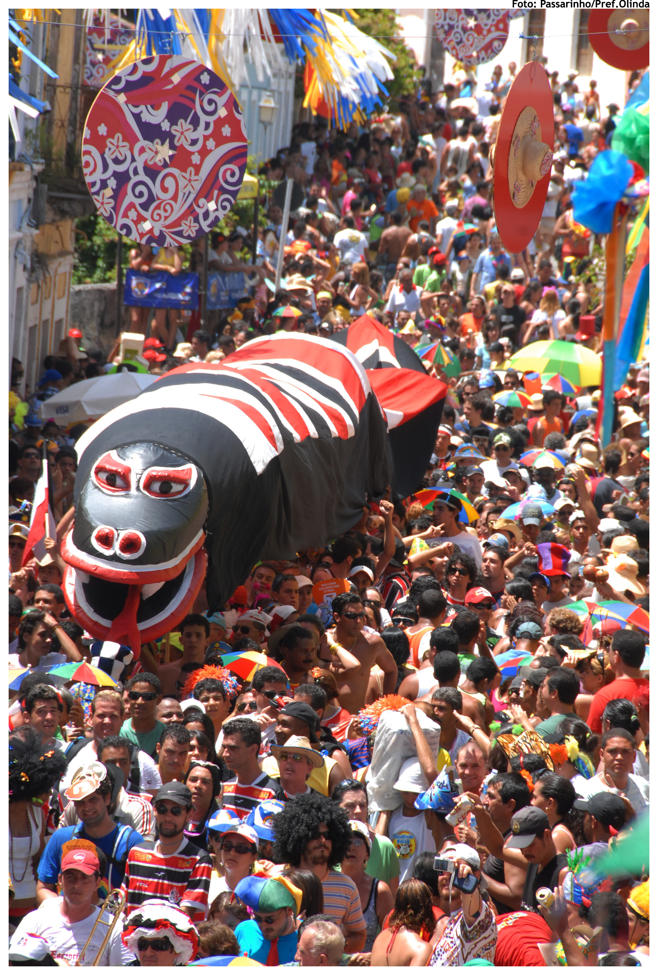 Foto: Passarinho/Pref.Olinda